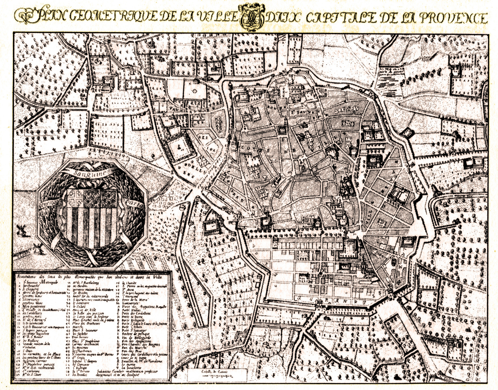 Plan géométrique de la ville d'Aix, capitale de la Provence